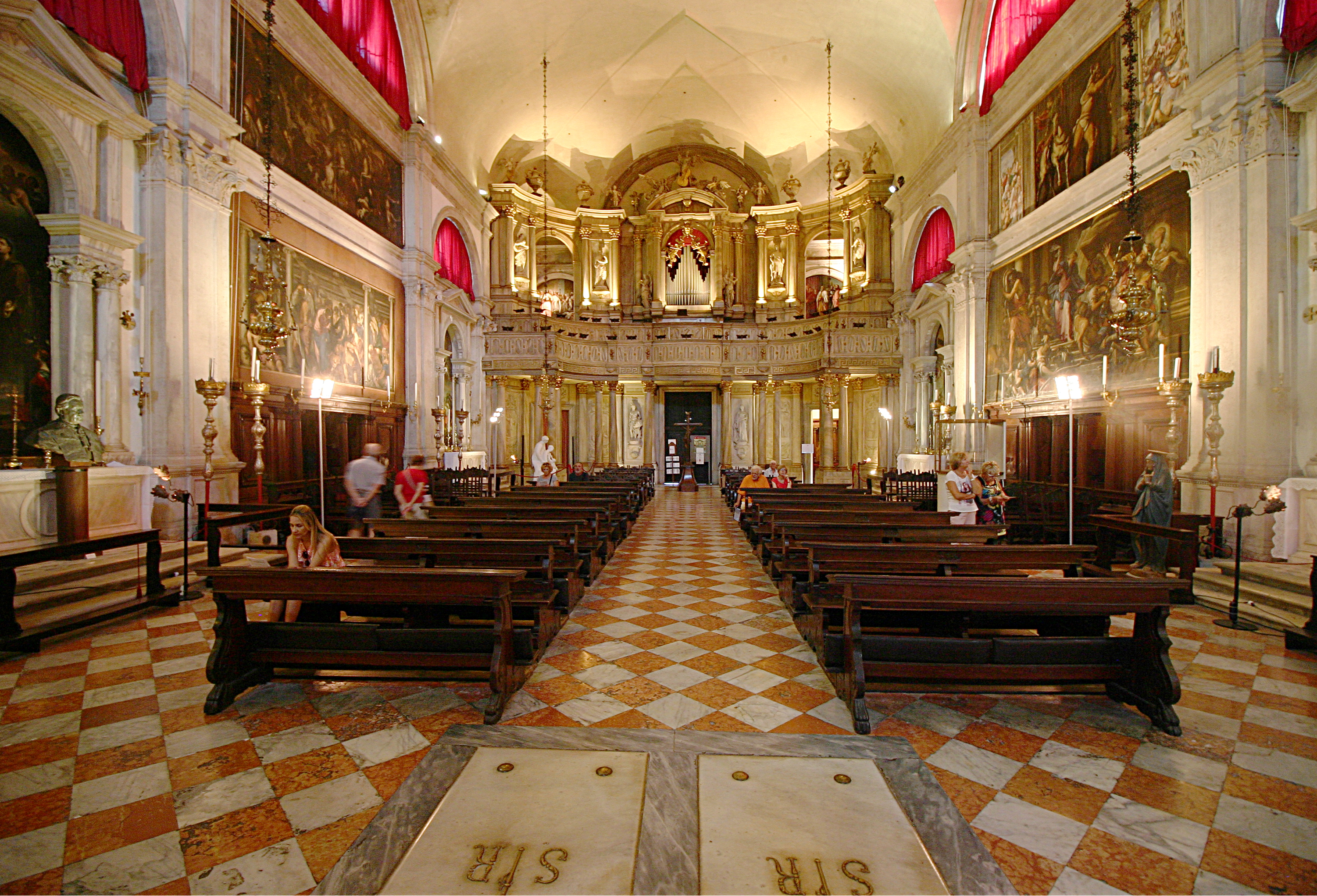 San Rocco - Venice